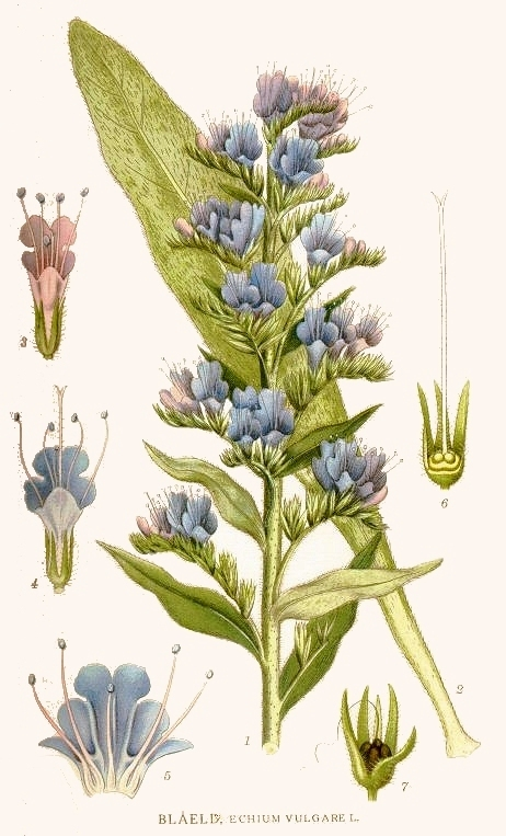 Original Description Blåeld, Echium vulgare L.